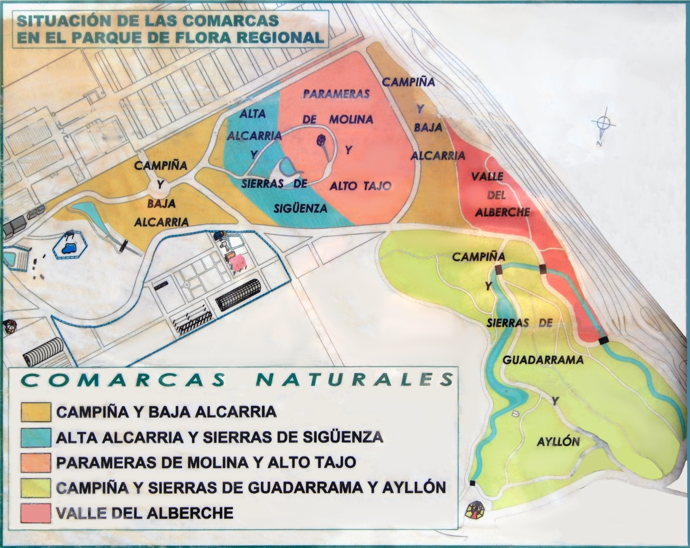 Plano de las comarcas naturales en el parque de flora regional del Real Jardín Botánico Juan Carlos I de la Universidad de Alcalá (Alcalá de Henares - España).